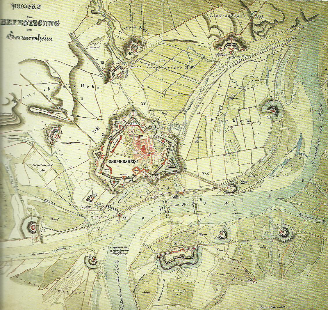 Projekt zur Befestigung von Germersheim